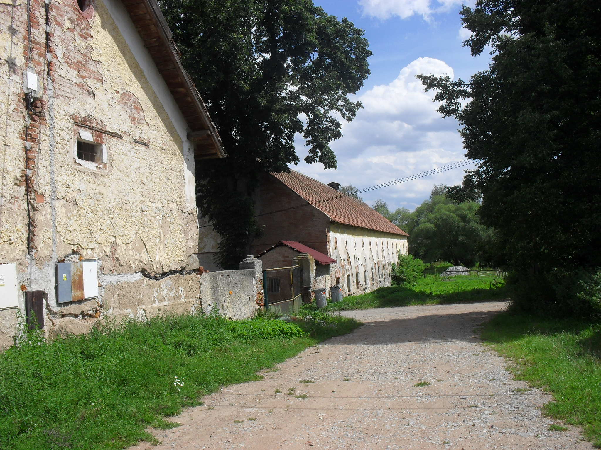 Statek v Radíkovicích, část obce Benešov.